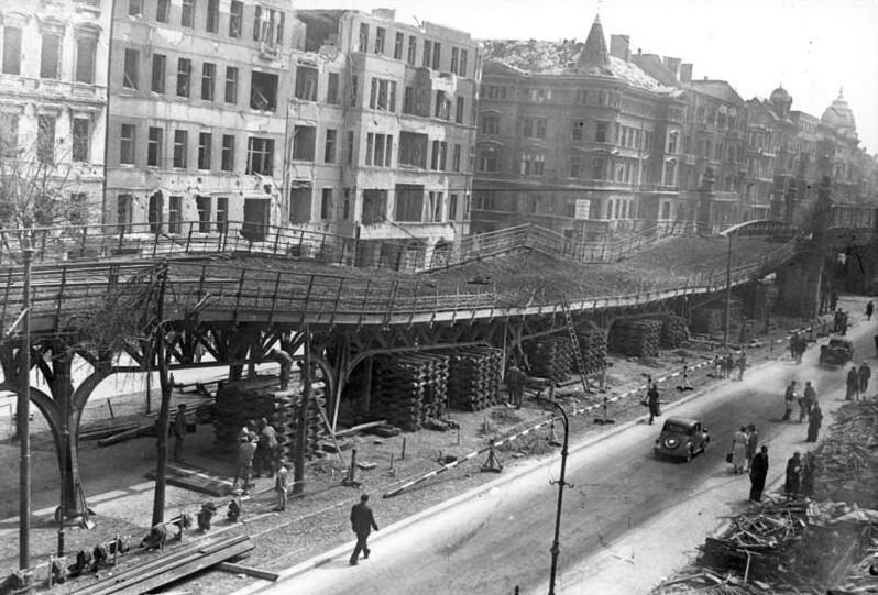 Berlin, Bombenschäden an der Hochbahn Zentralbild 25.7.1944: Bombenschaden an der Hochbahnstrecke in Berlin-Schöneberg. Der Viadukt an der Bülowstraße erhielt am 19. Juli 1944 bei der Explosion einer Luftmine schwere Verwerfungen. Durch Holzstapel und Balken wird die Strecke provisorisch abgestützt. [ScherlBilderdienst]